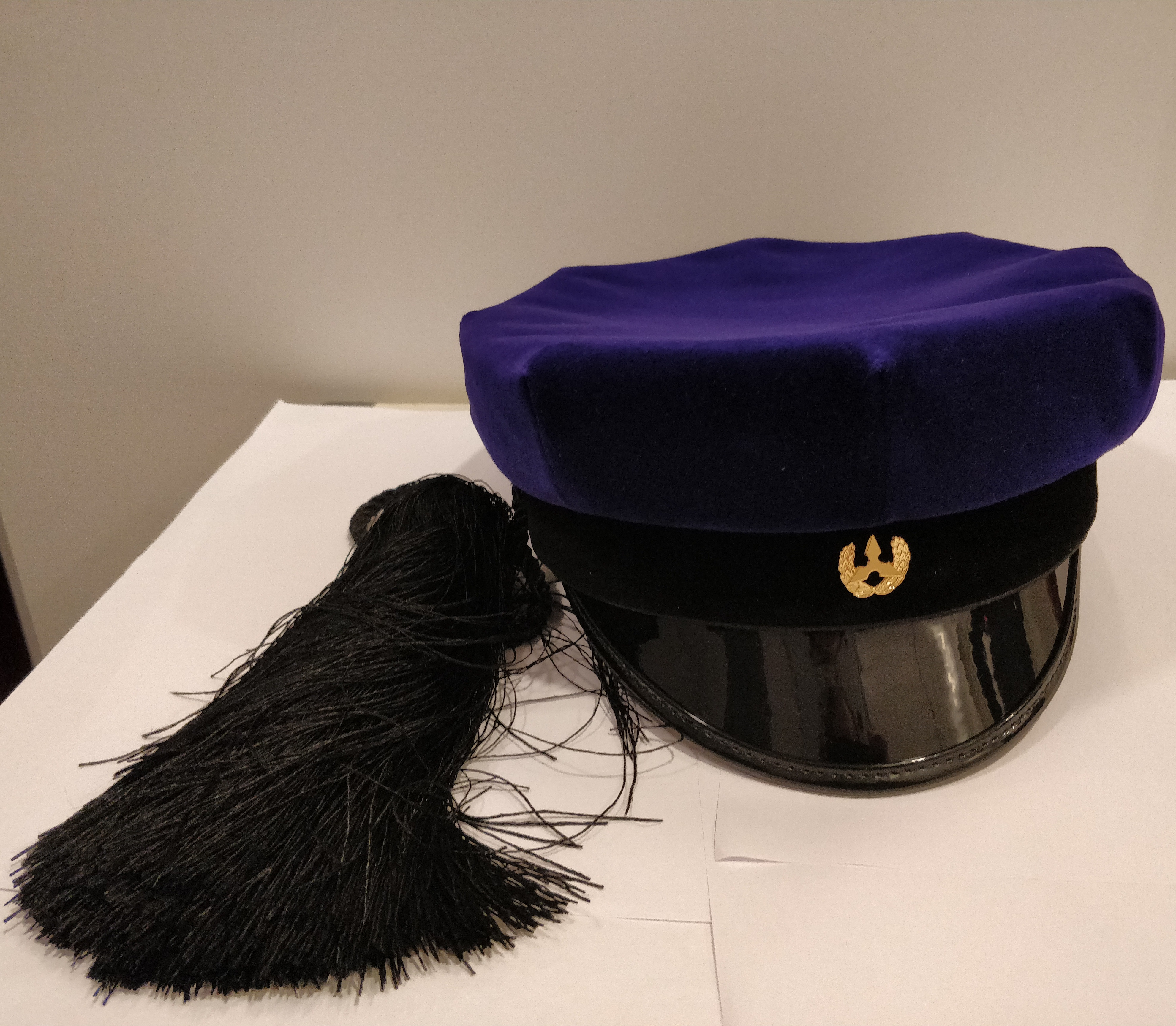 Insinöörilakki, virallinen Insinööriliiton päähine, joka on tarkoitettu insinööriopiskelijoille ammattikorkeakouluissa ja jo valmistuneille opiskelijoille.